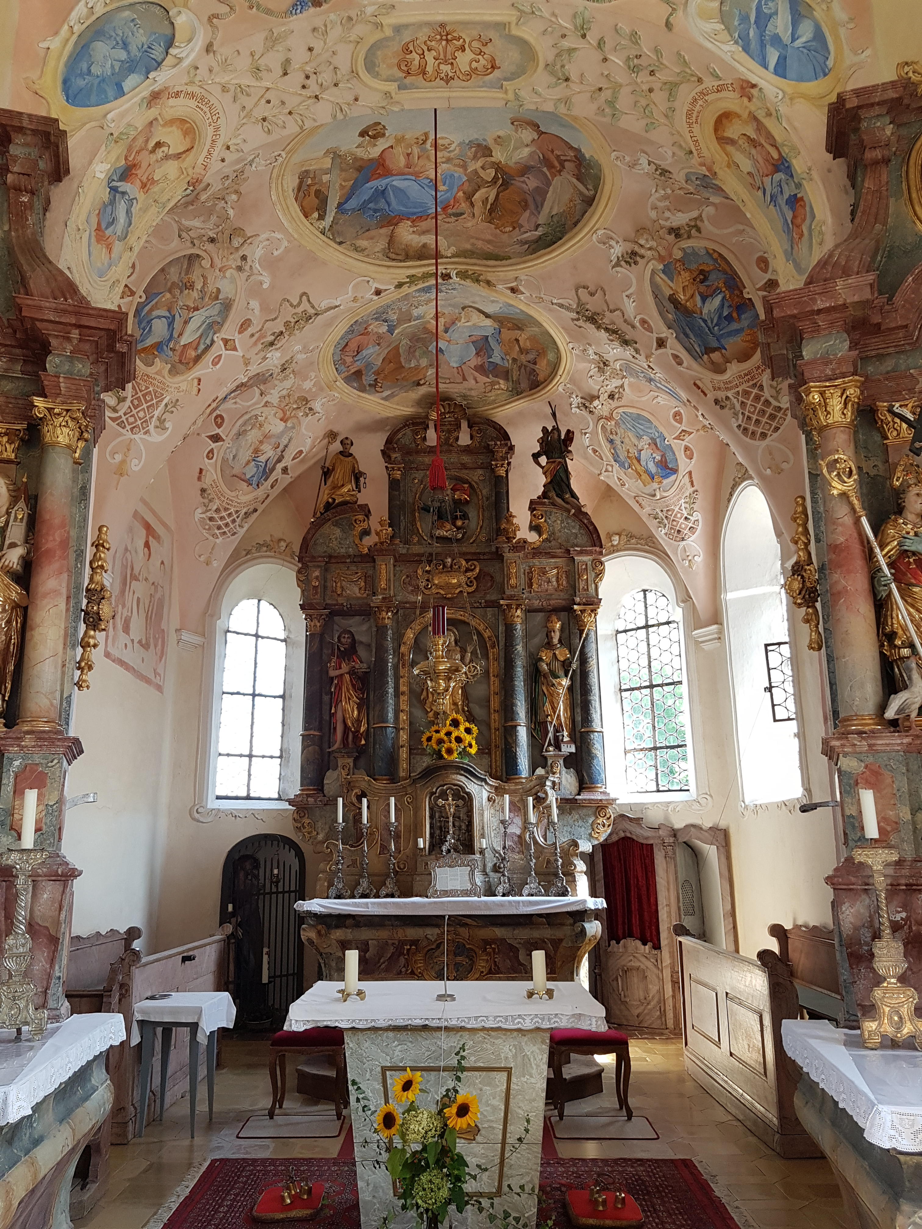 Hofheim (Spatzenhausen), St. Johannes Evangelist